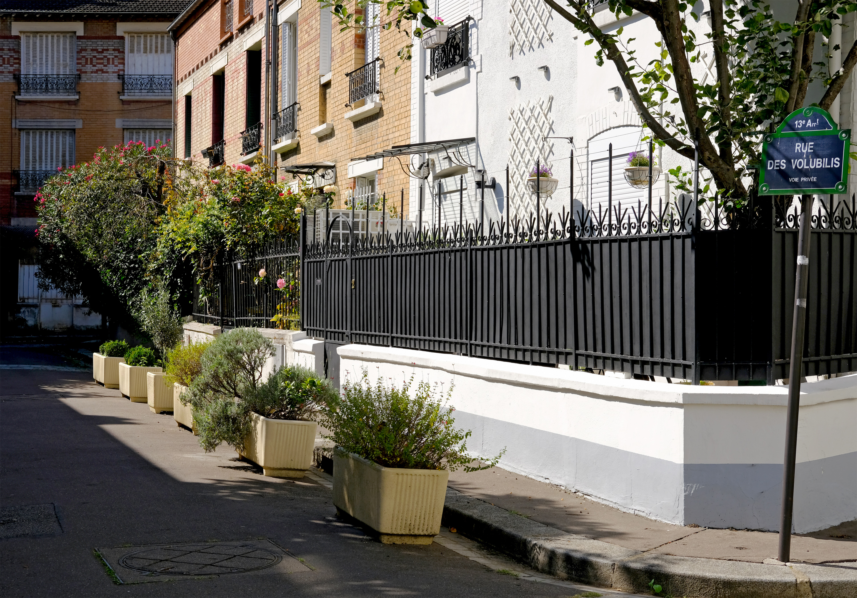 Cité florale (rue des Volubilis) - Paris XIII